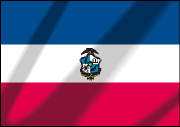 Bandera municipal de San Miguel, El Salvador